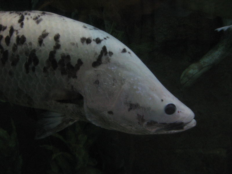 Tête de Barramundi pie (Lates calcarifer)